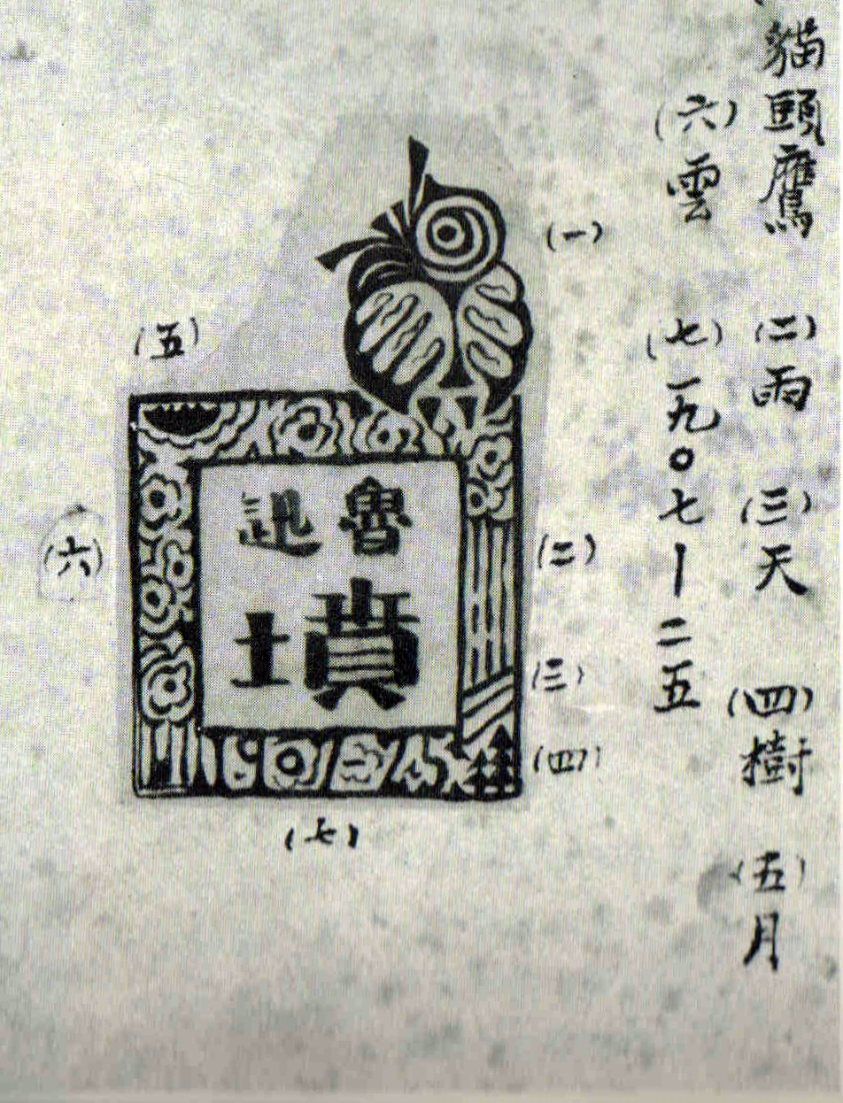 《坟》封面设计图案